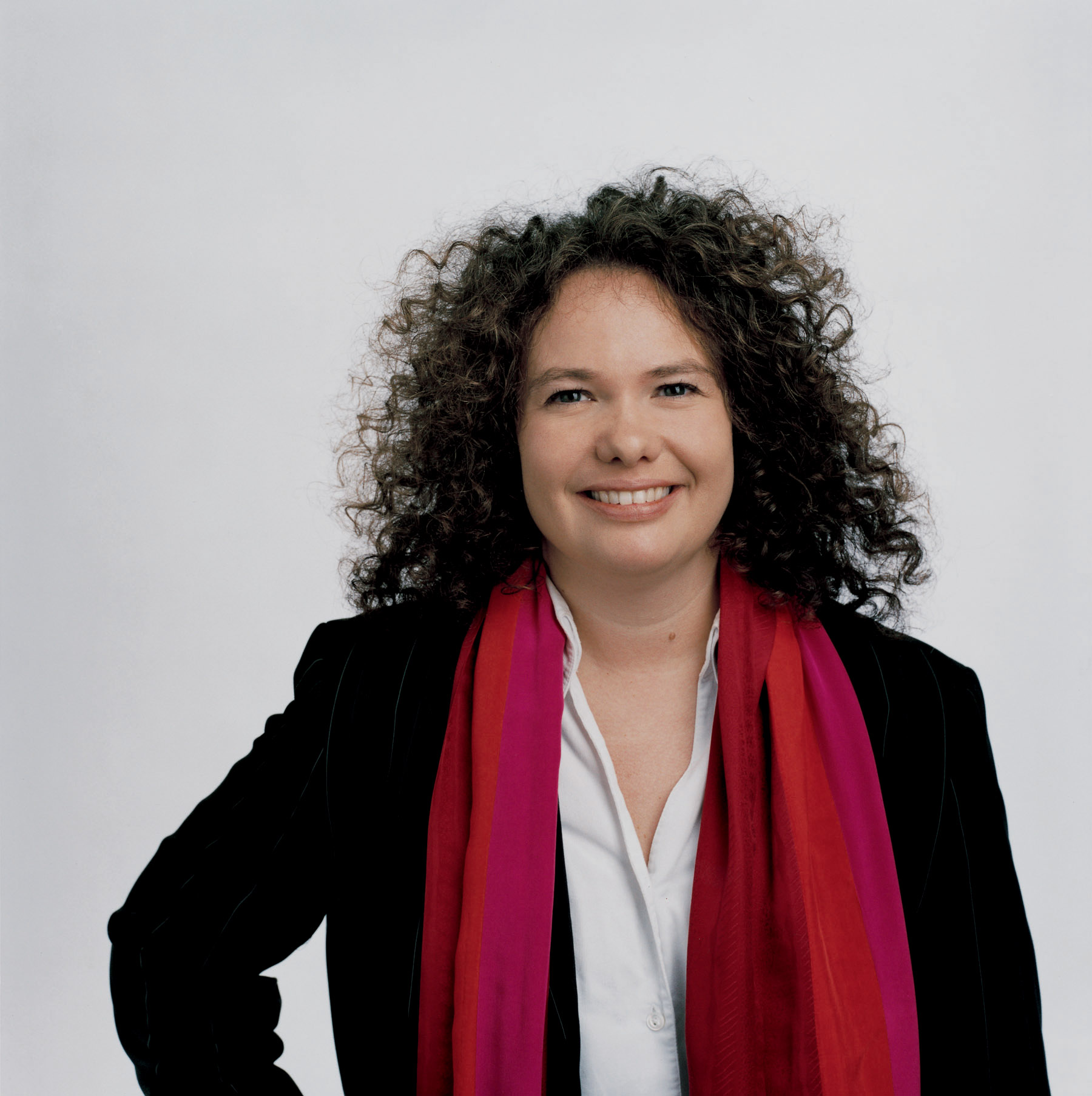 Monika Vana. Wiener Stadträtin (Die Grünen)